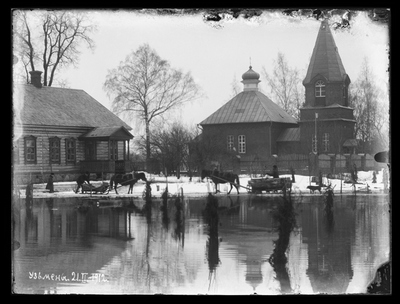 Беларуская (тарашкевіца): Узьмёны (Uźmiony). Мікалаеўская царква-мураўёўка